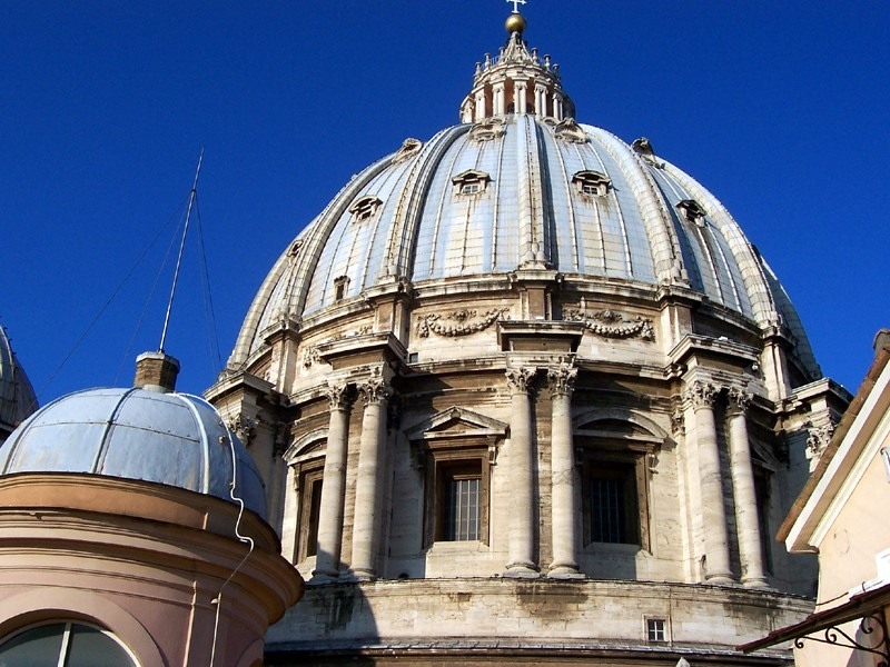 Città del Vaticano - Cupola della Basilica di S. Pietro